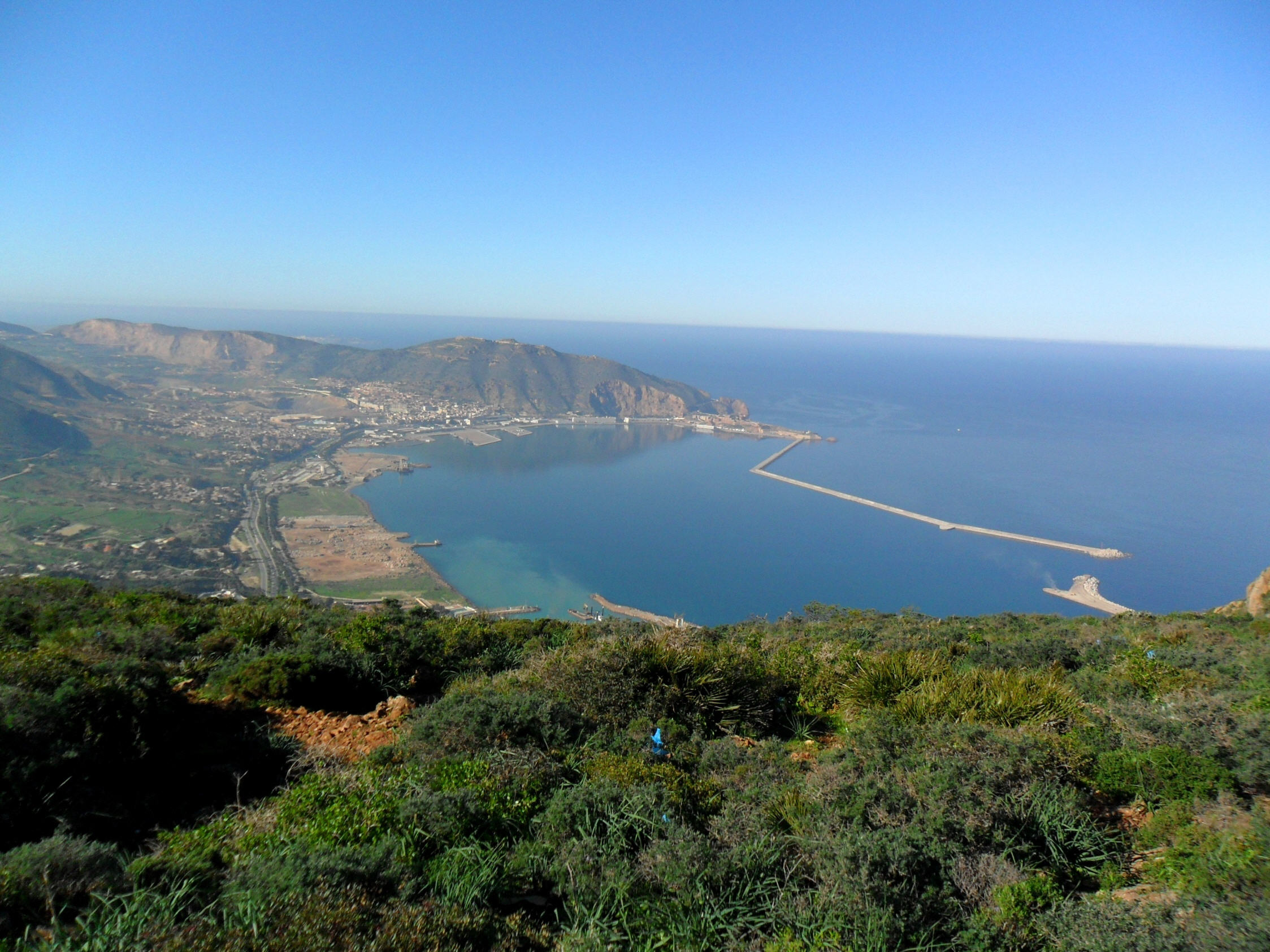 base navale de Mers el-kebir